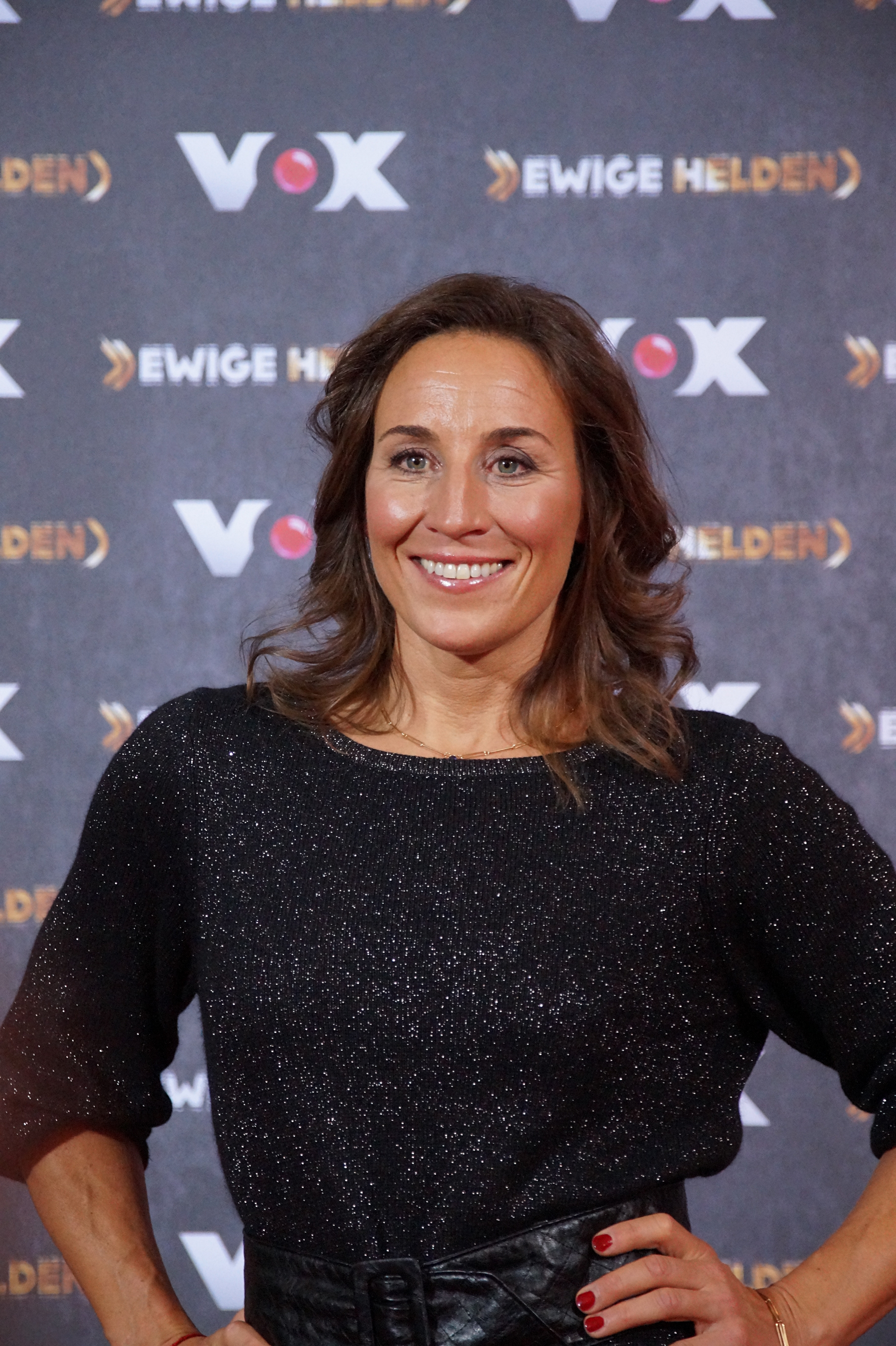 Nicola Thost beim VOX "Ewige Helden" Pressetermin, im Dezember 2015.